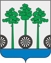 Герб Няндомы Архангельской области